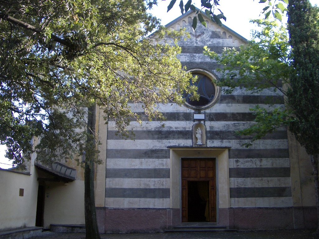 Convento e Chiesa Frati Cappuccini This is a photo of a monument which is part of cultural heritage of Italy.